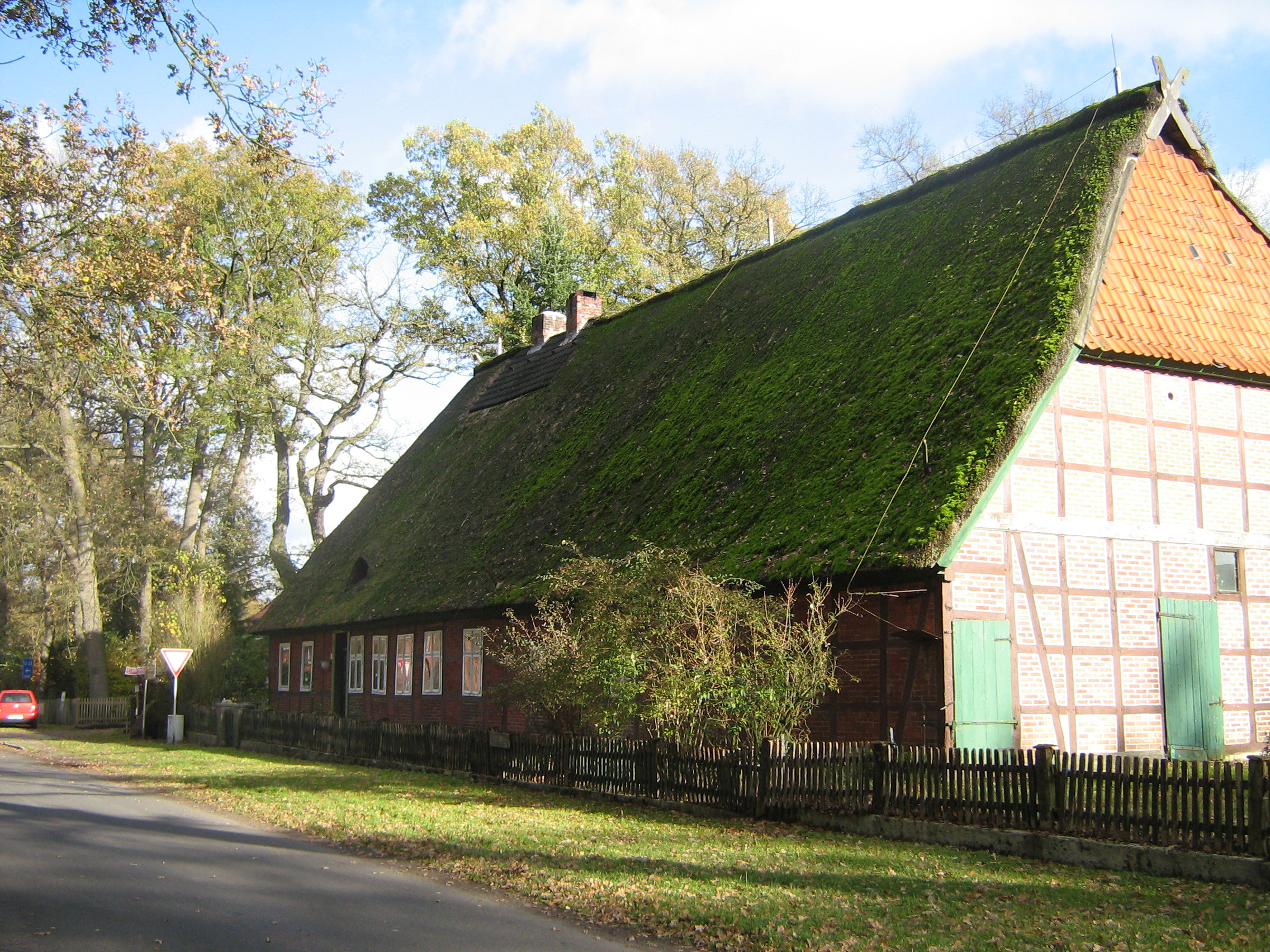 Baudenkmal in Bispingen Hützel Wohnwirtschaftsgebäude